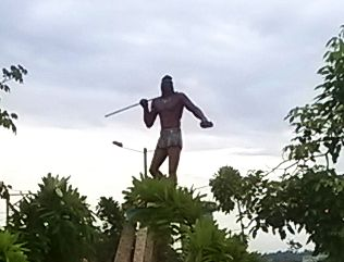 Estatua de Jumandy en Tena